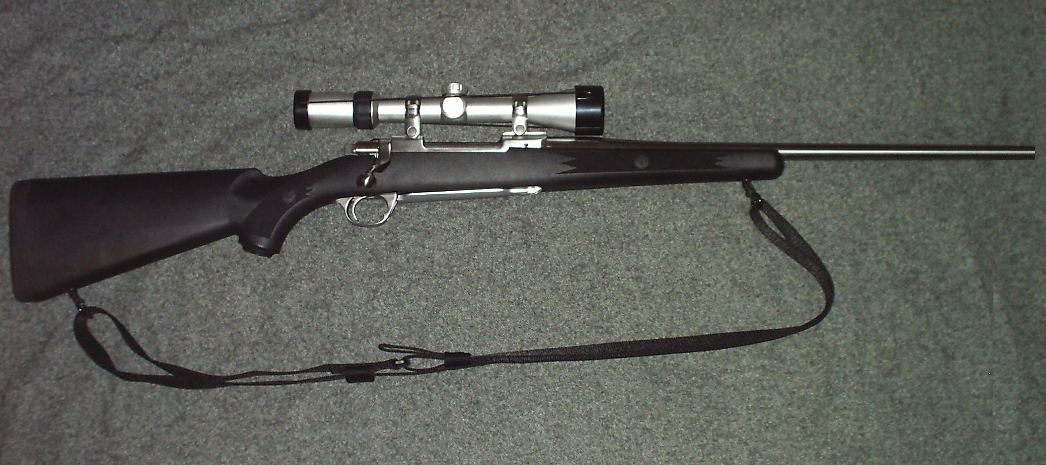 Ruger M-77 Mark II .270 WIN